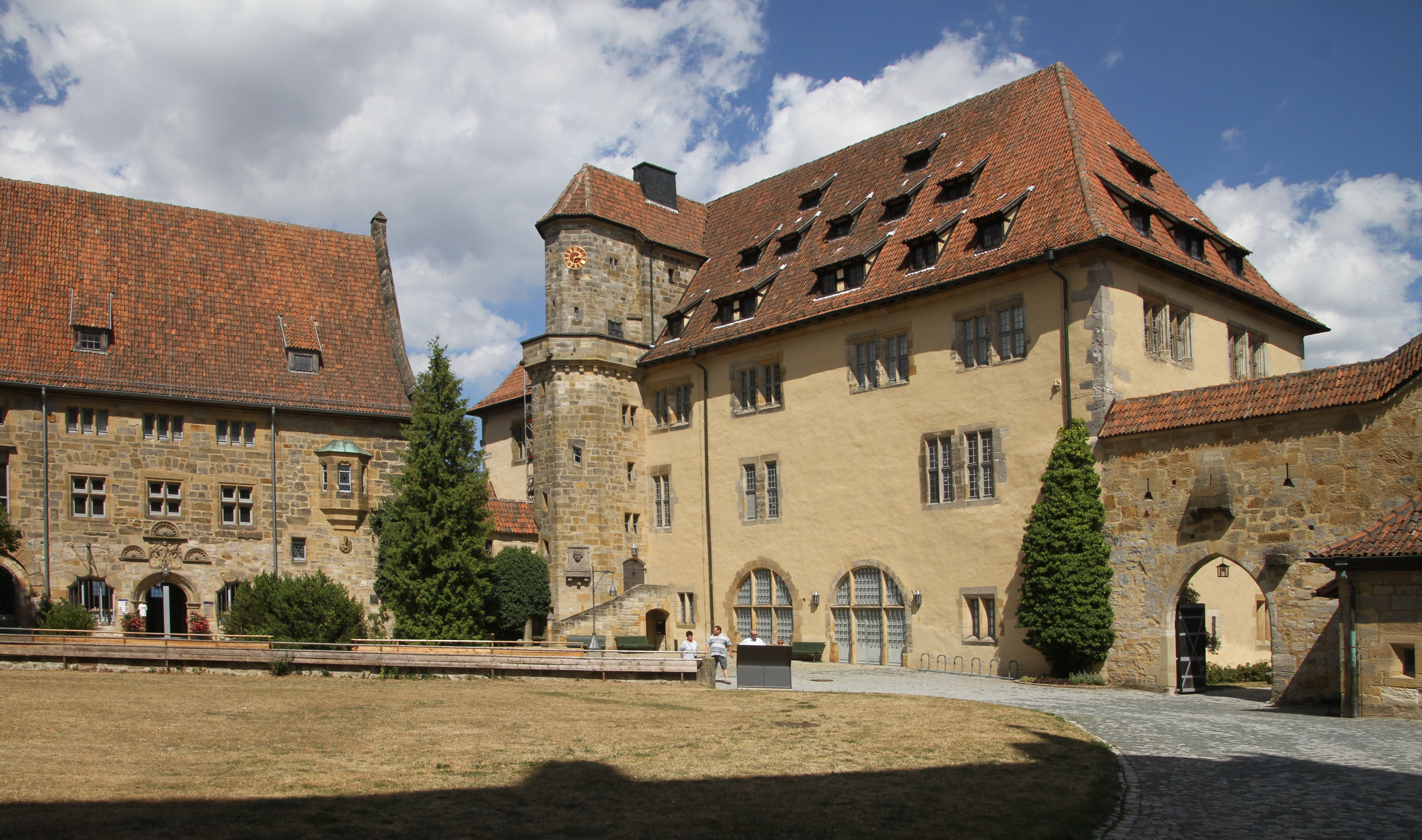 Veste Coburg